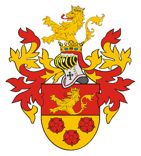 Herb rodowy rodziny Turzo (Thurzo)